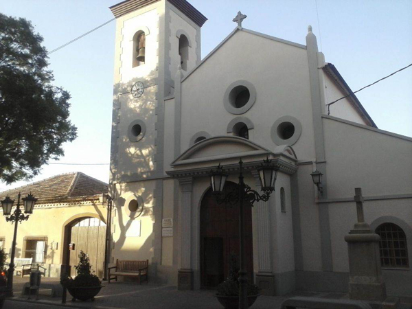 Iglesia NUESTRE SEÑORA DE LOS ÁNGELES de Sangonera la Verde